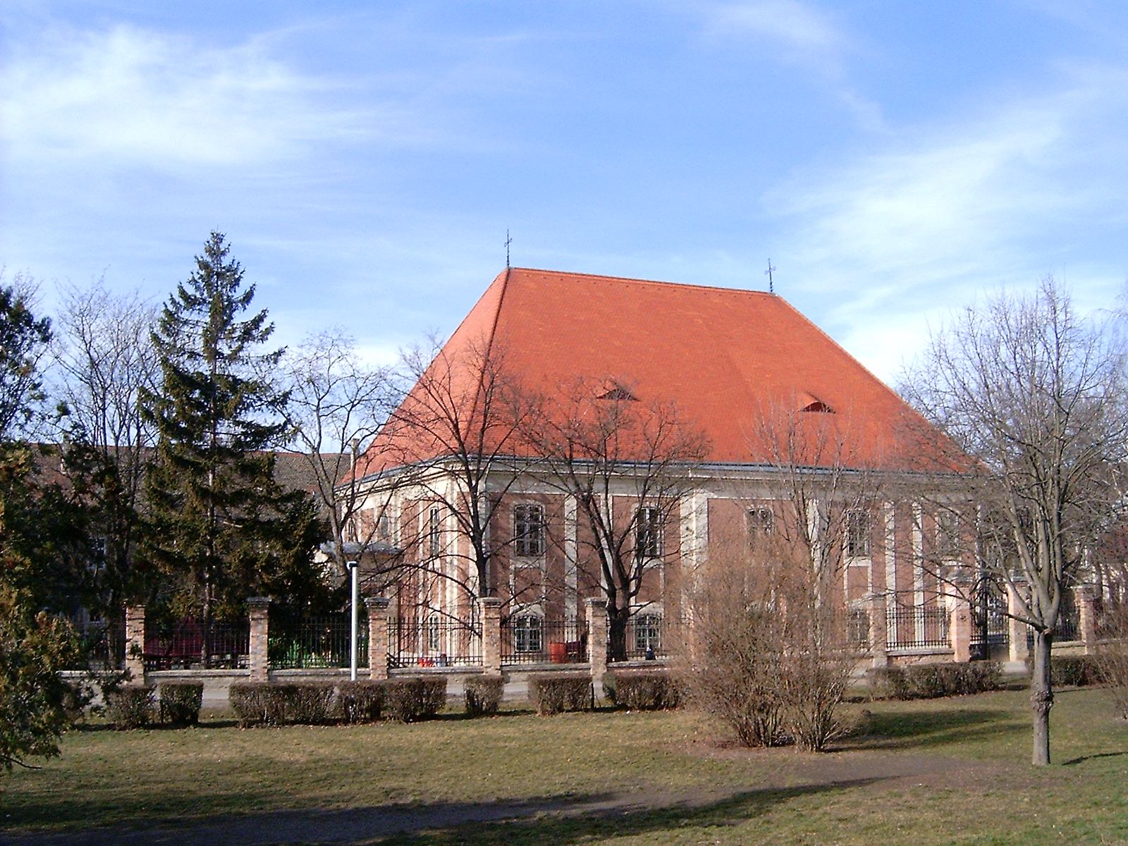 A győri evangélikus Öregtemplom (Győr-Moson-Sopron megye)